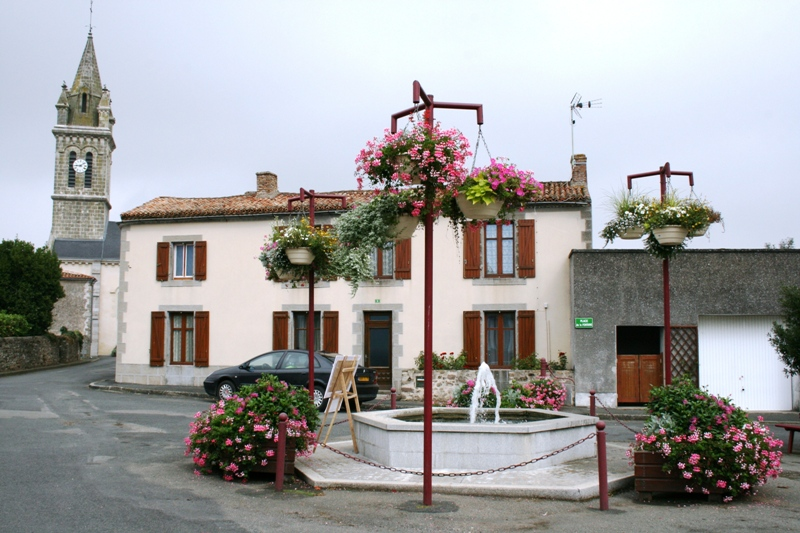 Noirlieu centre-bourg, avec en arrière plan l'église Saint-Germain, Bressuire, Deux-Sèvres (France).